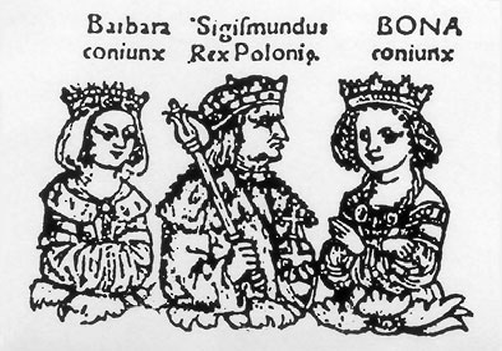 Drzewo genealogiczne Jagiellonów - Barbara Zapolya, Zygmunt I Stary i Bona Sforza